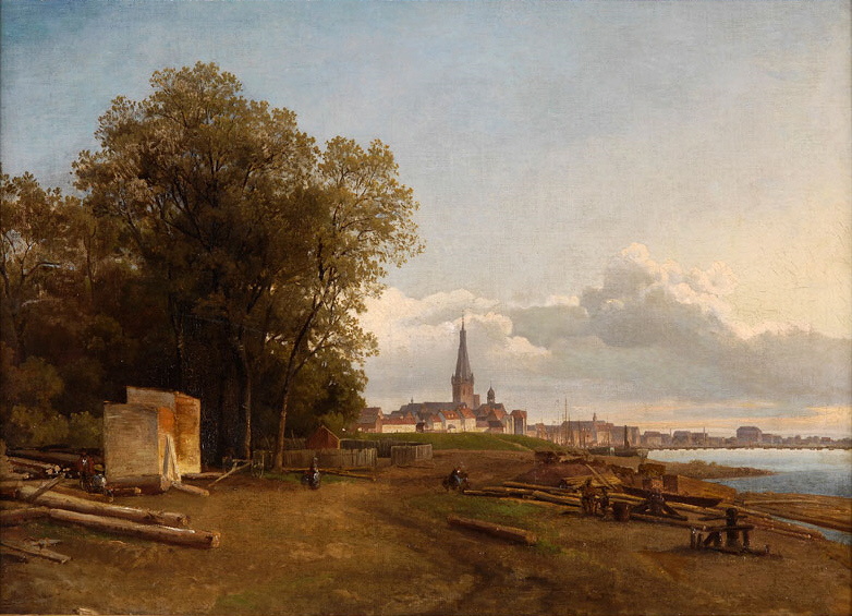 Ansicht von Düsseldorf mit Blick auf Lambertus, Öl auf Leinwand, 64 x 88 cm